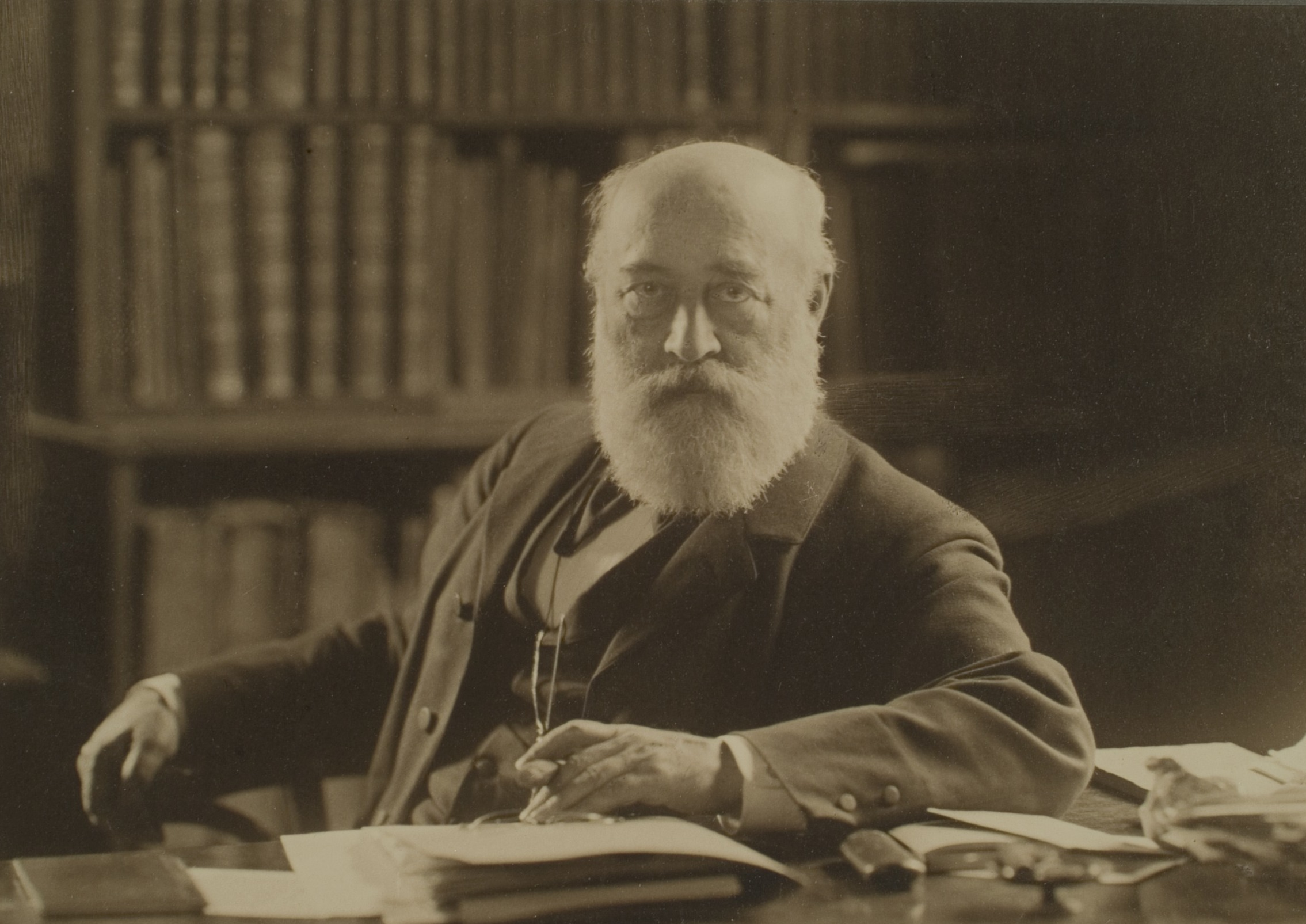 Ernst Otto Adalbert Merx, Theologe, 1875–1909 Professor in Heidelberg